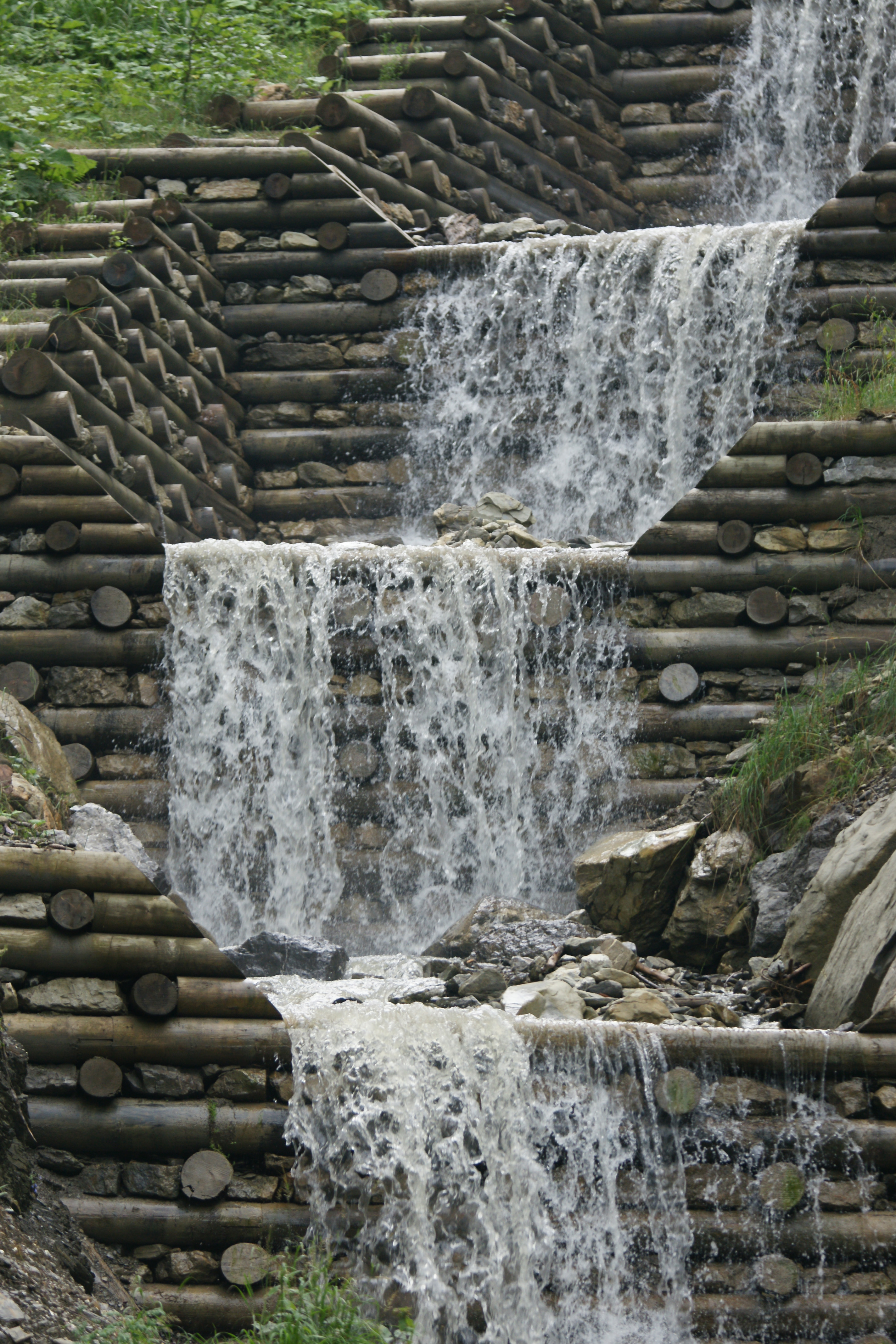 Dosiersperren, Wildbachsperren, Stützbauwerke der WLV Wildbach- und Lawinenverbauung Vorarlberg im Emsbach-Briedler-Gebiet in Hohenems.